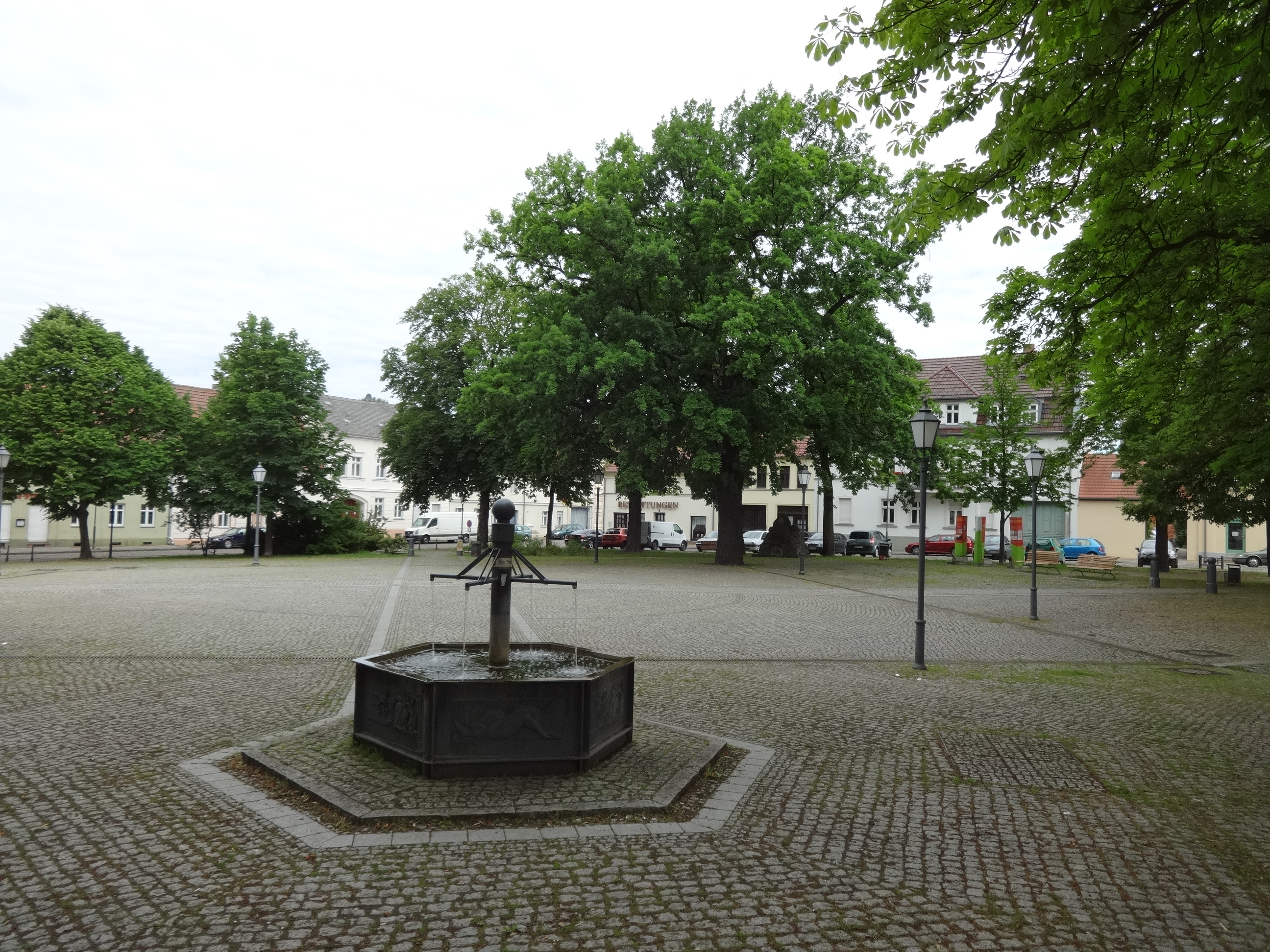 Marktplatz in Altlandsberg, Landkreis Oder-Spreewald, Brandenburg